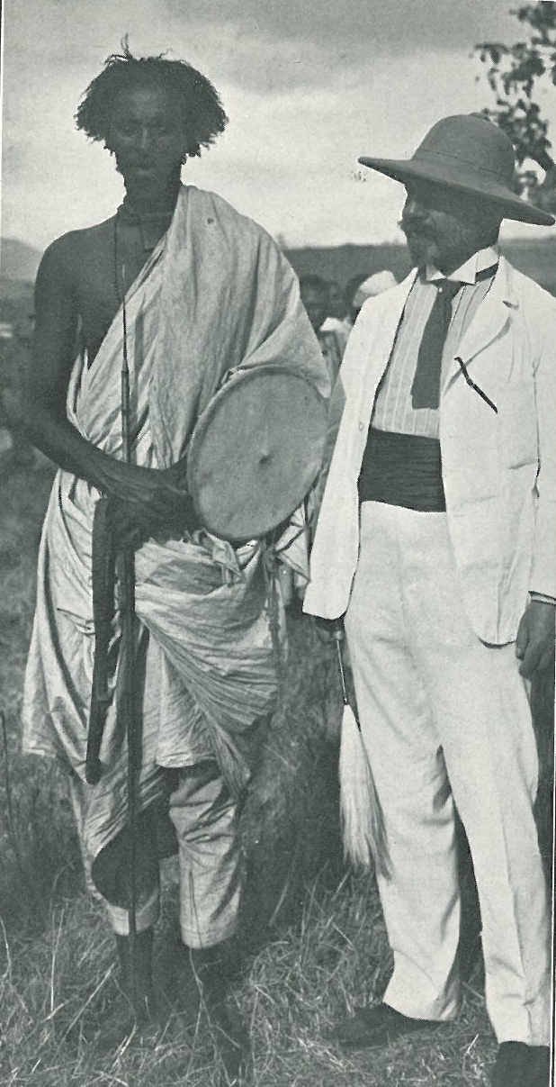 Scheual Abdi, Dichter aus Ogaden